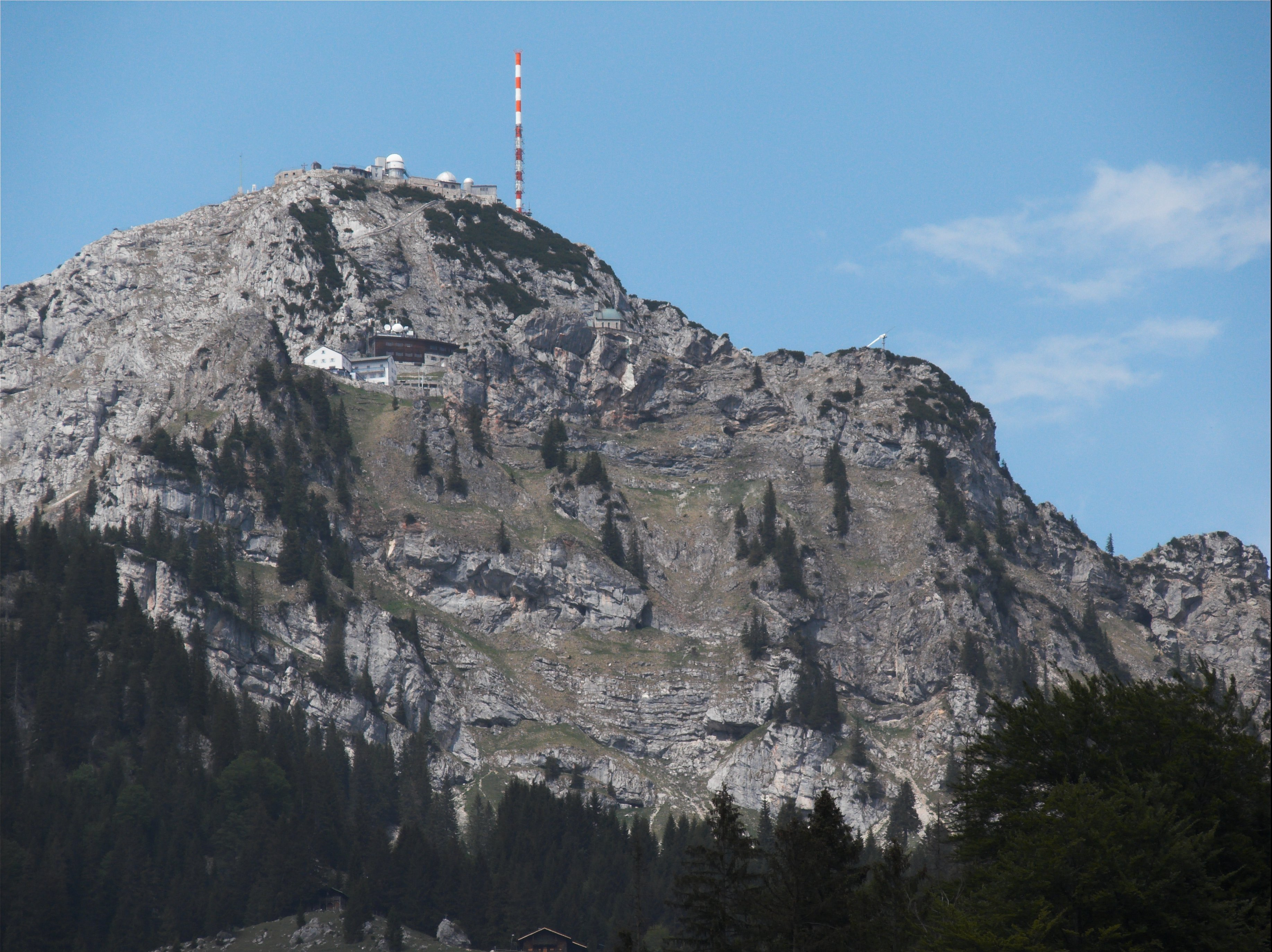 Der Wendelstein von Bayrisch-Zell aus gesehen